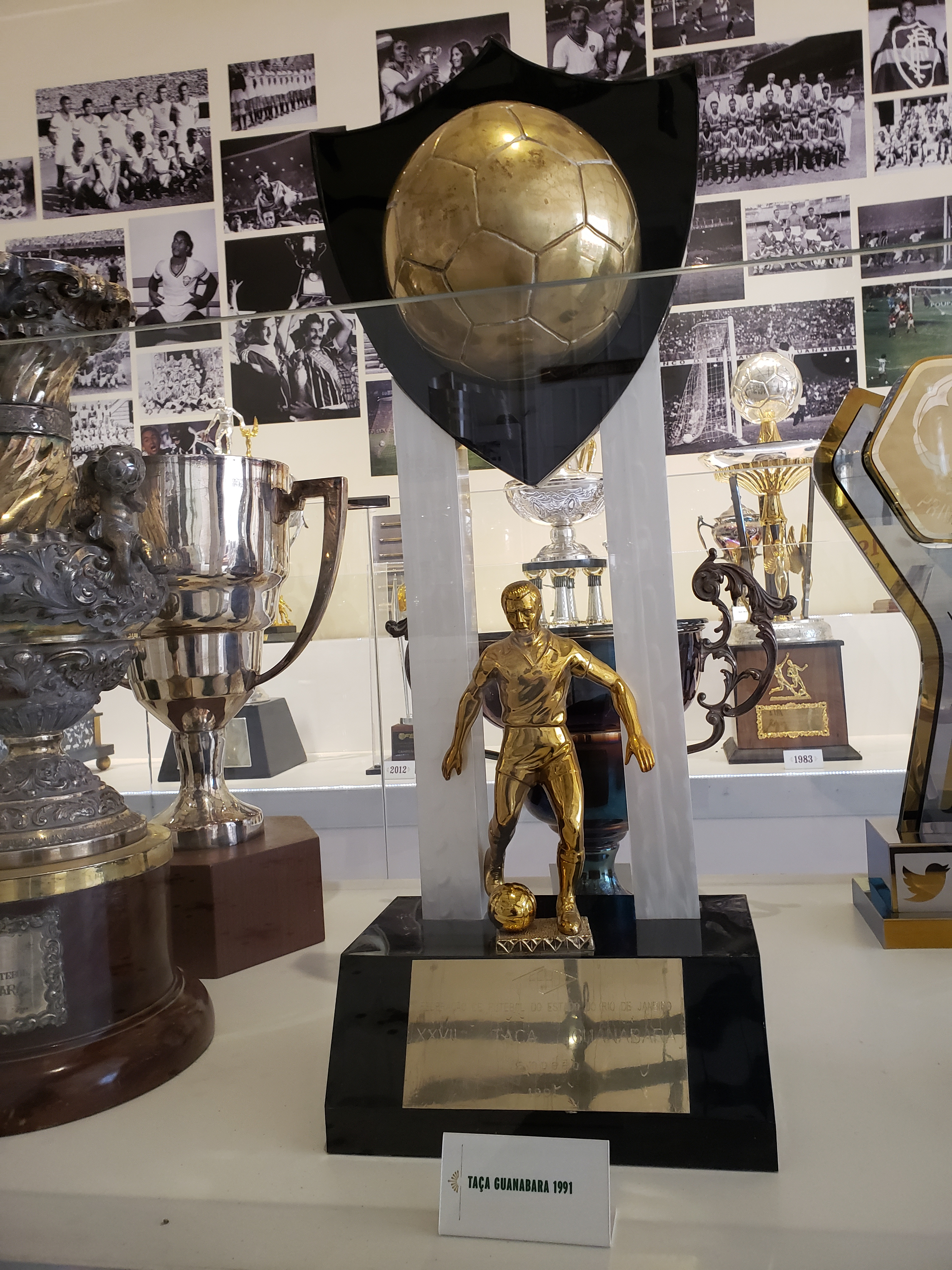 Taça Guanabara de 1991, conquistada pelo Fluminense Football Club.